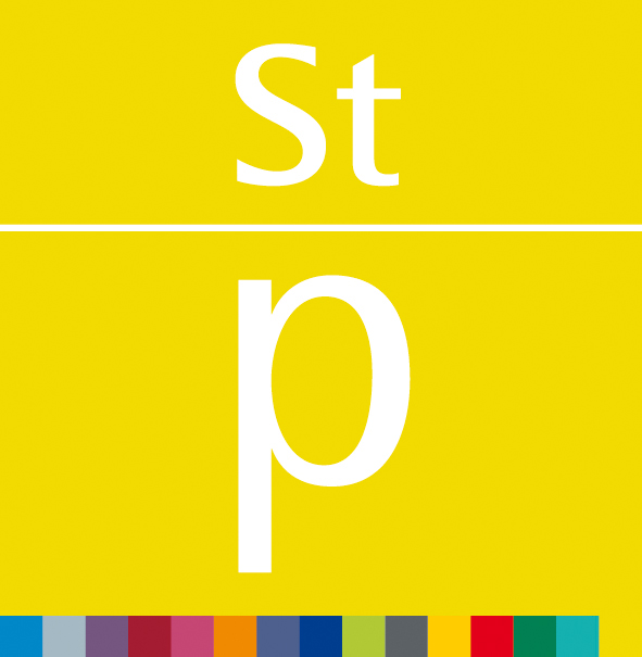 Logo des Staatspreises für Unternehmensqualität des österreichischen Bundesministeriums für Wirtschaft, Familie und Jugend